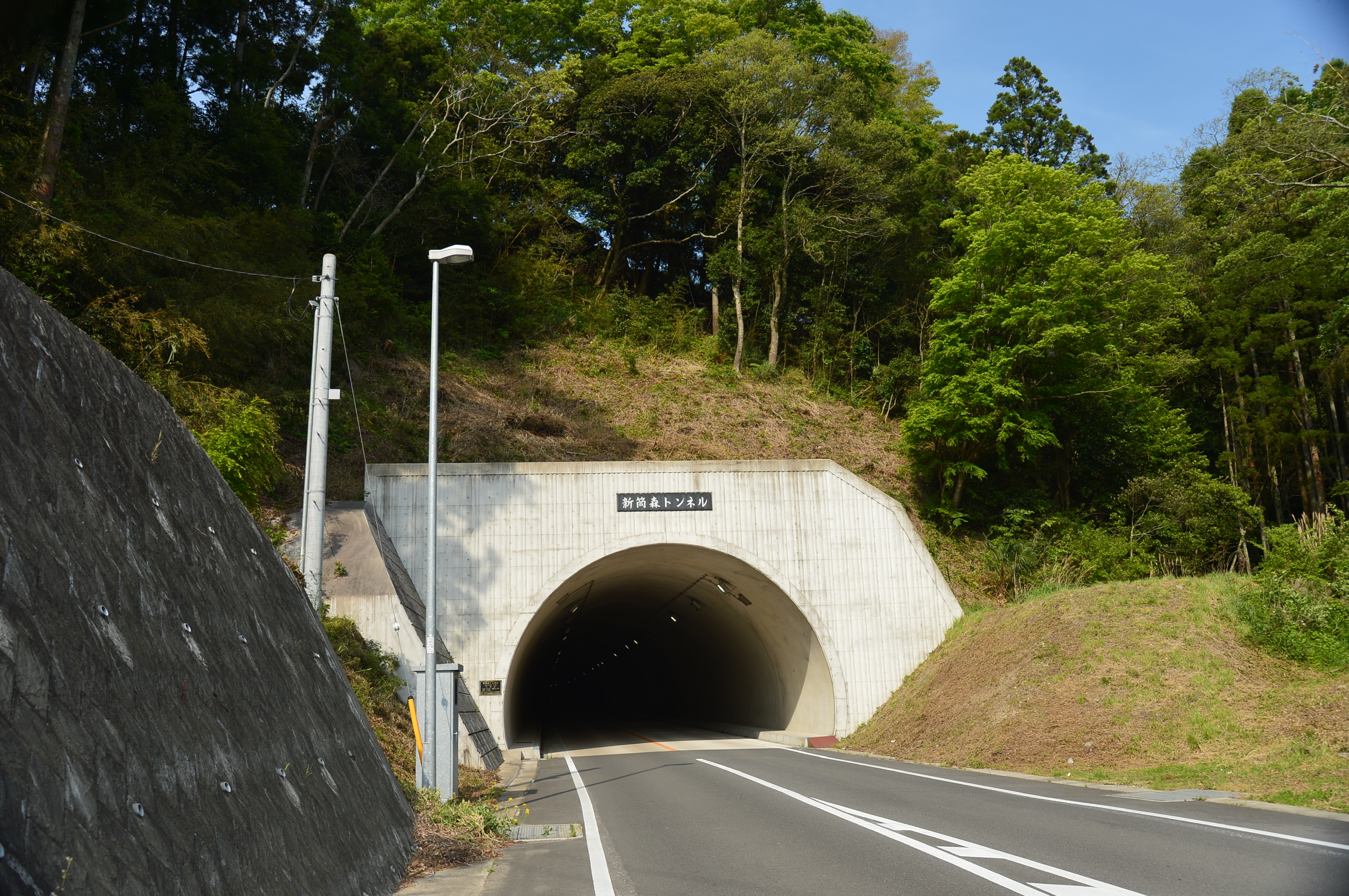 国道465号筒森バイパス上にある新筒森トンネルの千葉県大多喜町筒森側の坑口